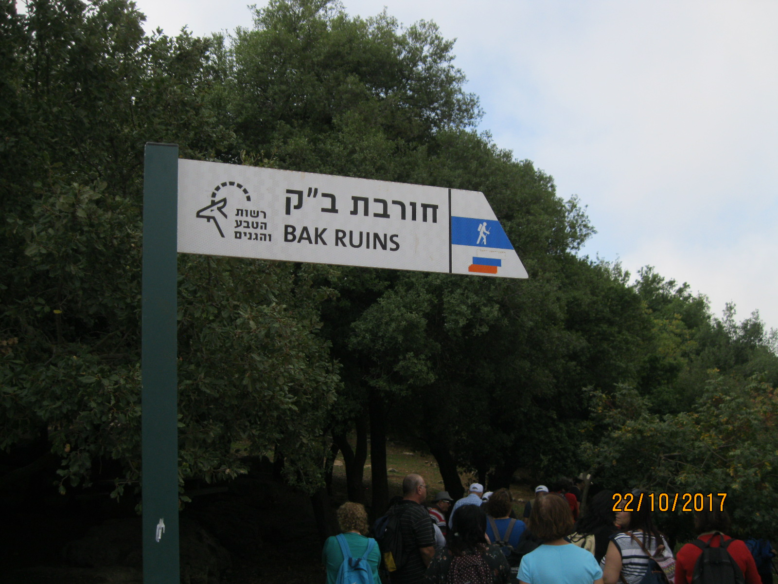 Bak Ruins